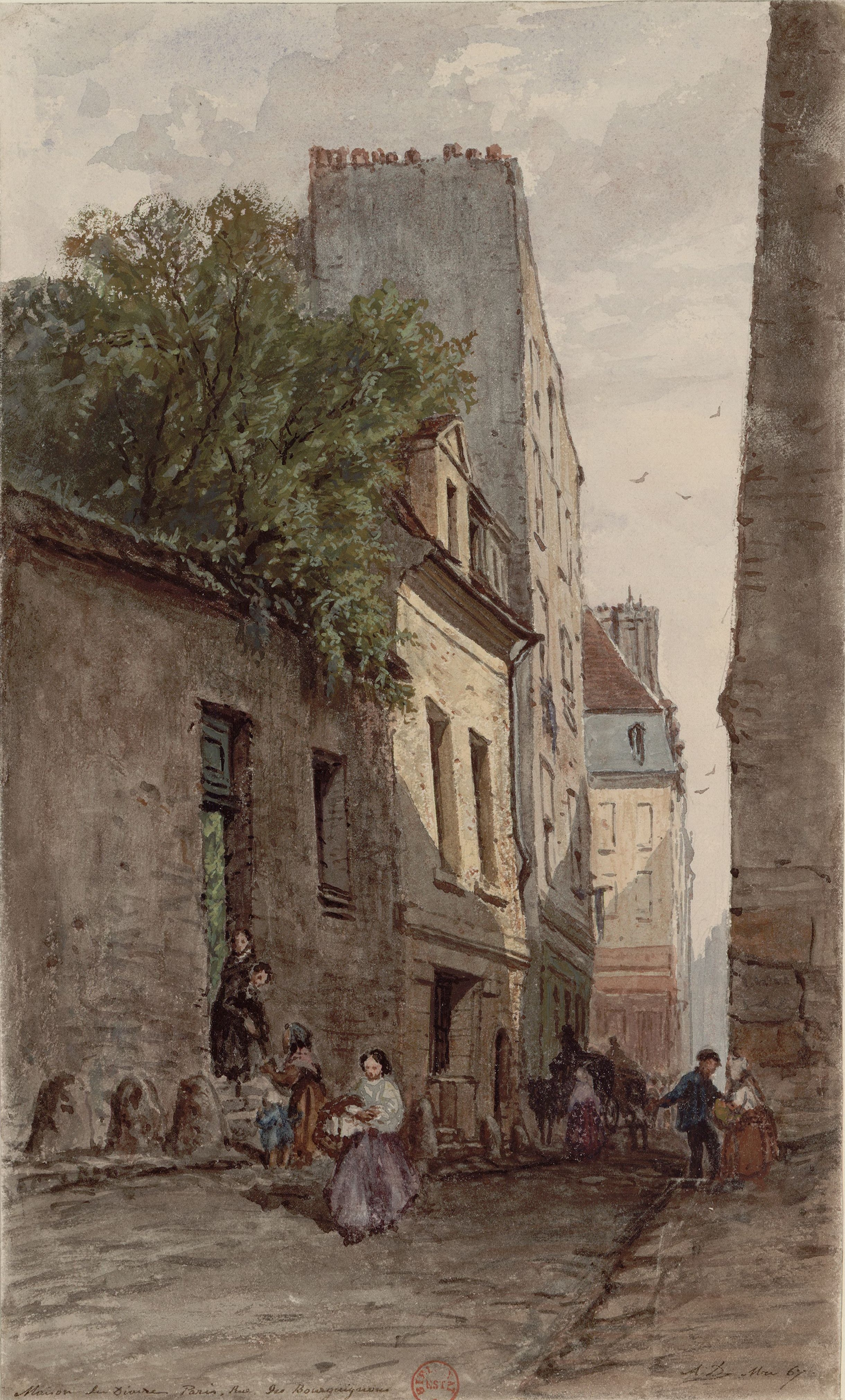 Maison du diacre François de Pâris (1690-1727), Paris, rue des Bourguignons (actuel boulevard de Port-Royal). Dessin par Adrien Dauzats (1804-1868).